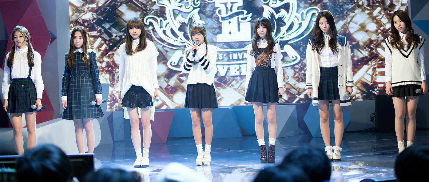 14.12.21 SAF 러블리즈 축하무대